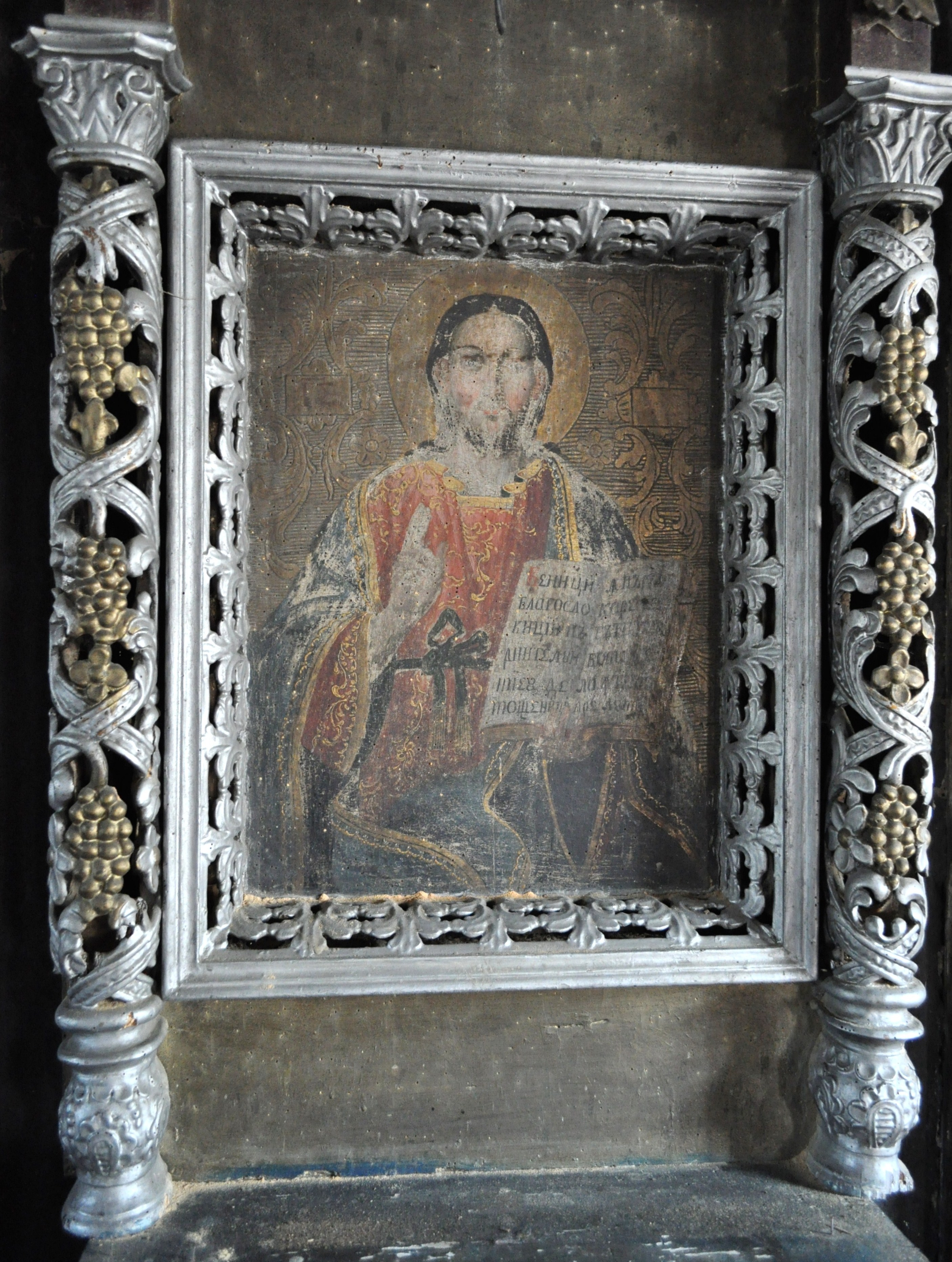 Biserica de lemn "Sfântul Nicolae", sat VALEA CHIOARULUI